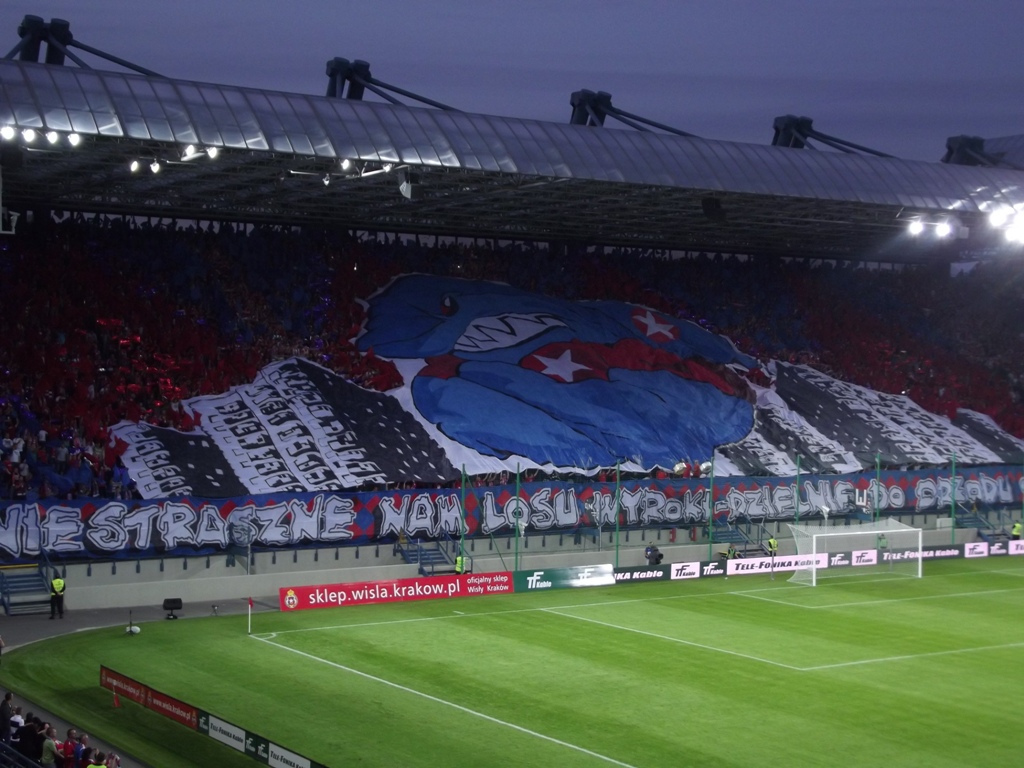 Zdjęcie zrobione podczas meczu eliminacji do Ligi Mistrzów UEFA pomiędzy Wisłą Kraków a Litexem Łowecz.